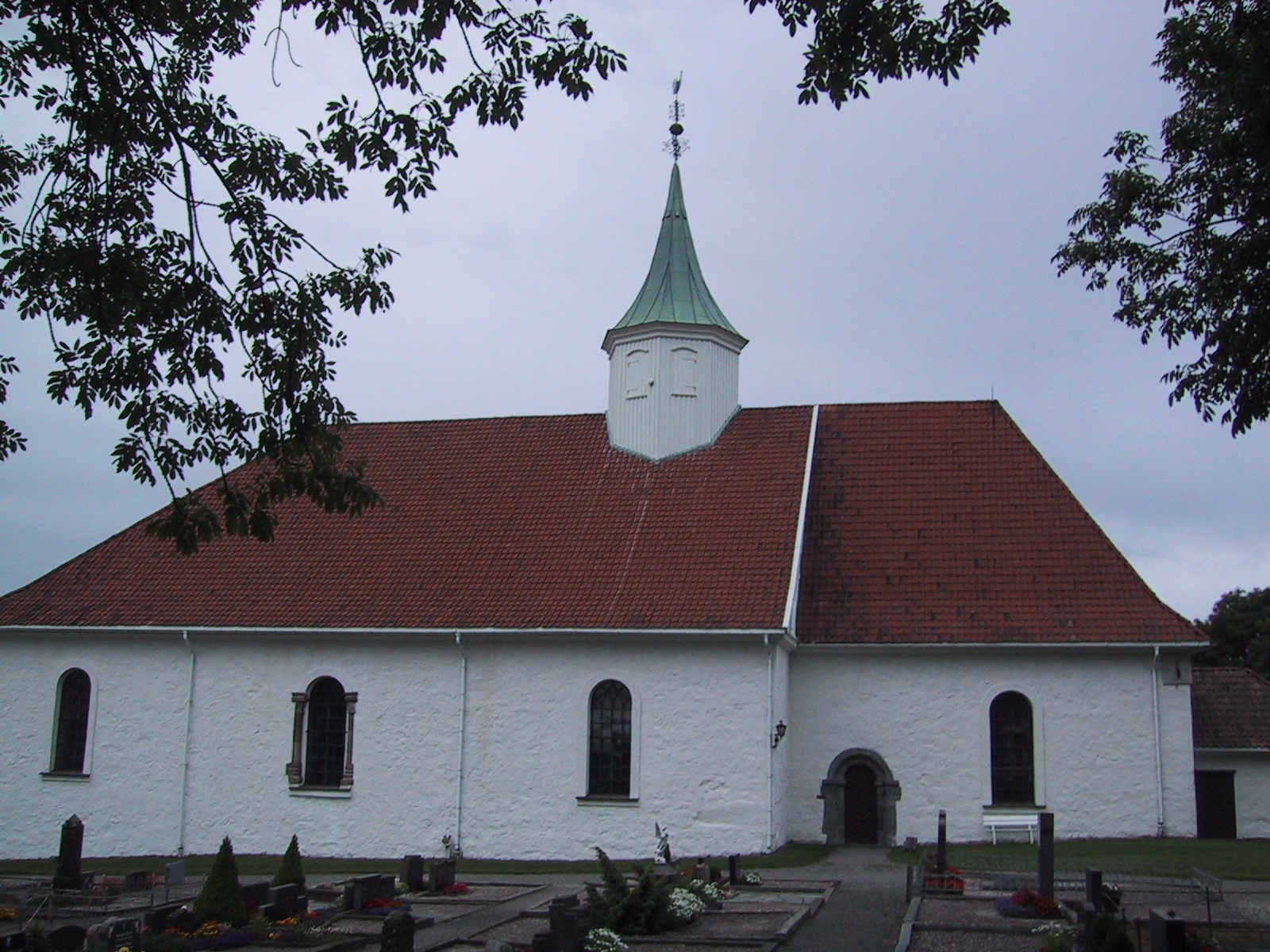 Tjølling kyrkje